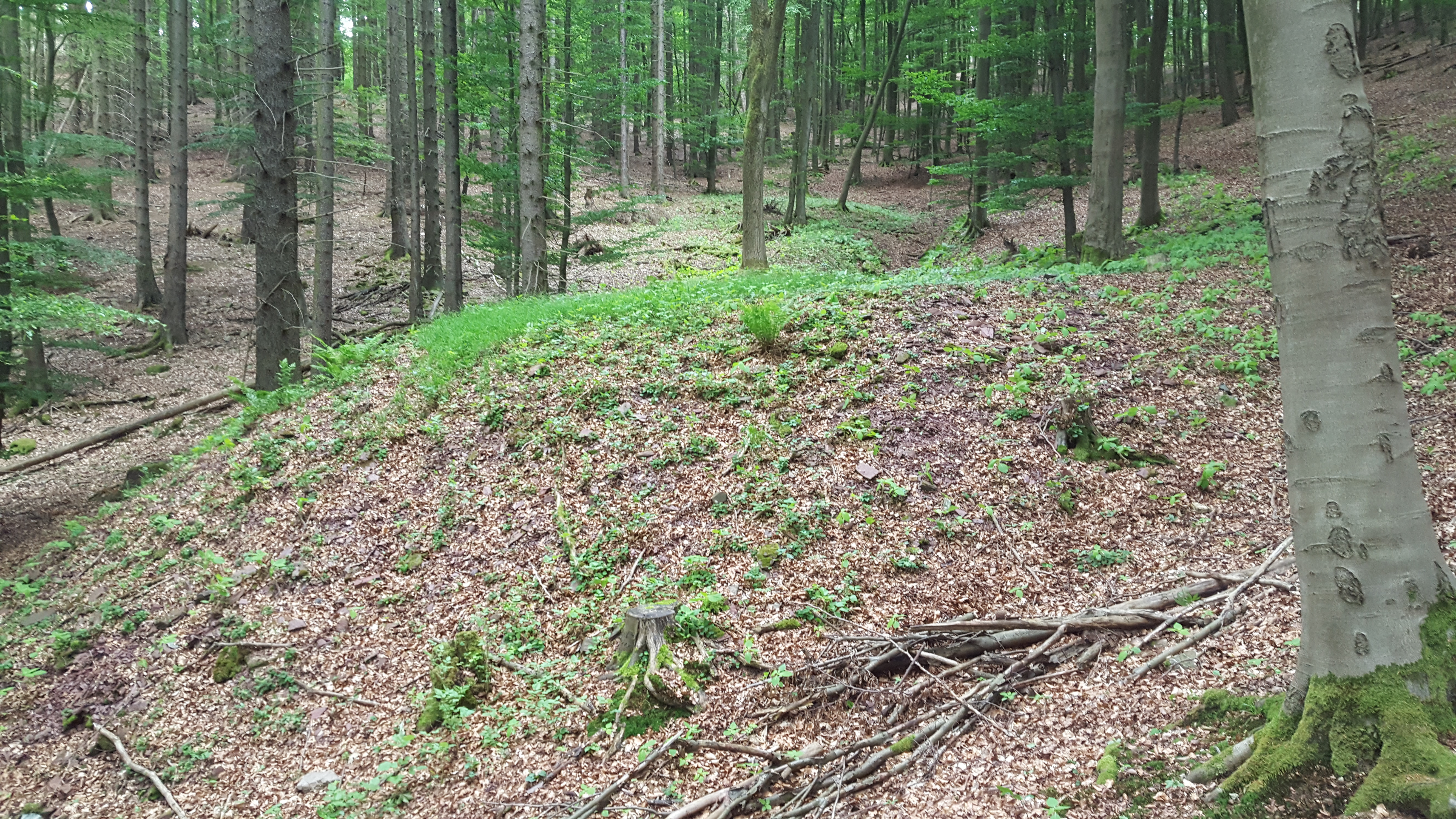 Halde der Eisengrube Rubin bei Sechshelden/Hessen